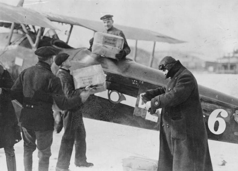 Scherl: Flugpost Berlin-Weimar. Einladen in Berlin-Johannisthal Februar 1919